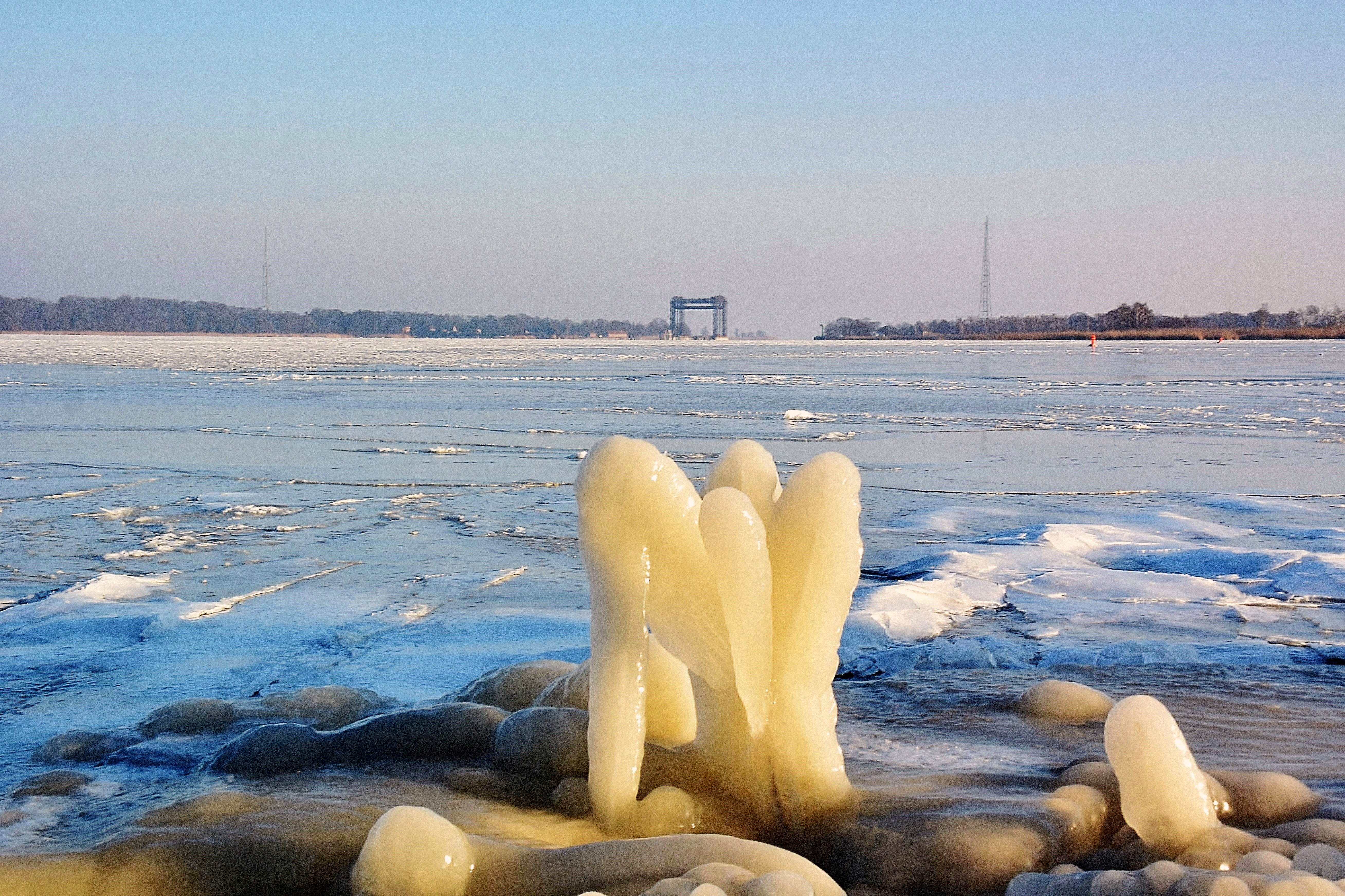 NSG Anklamer Stadtbruch gefrorener Peenestrom mit Blick auf die Karniner Eisenbahn Hubbrücke